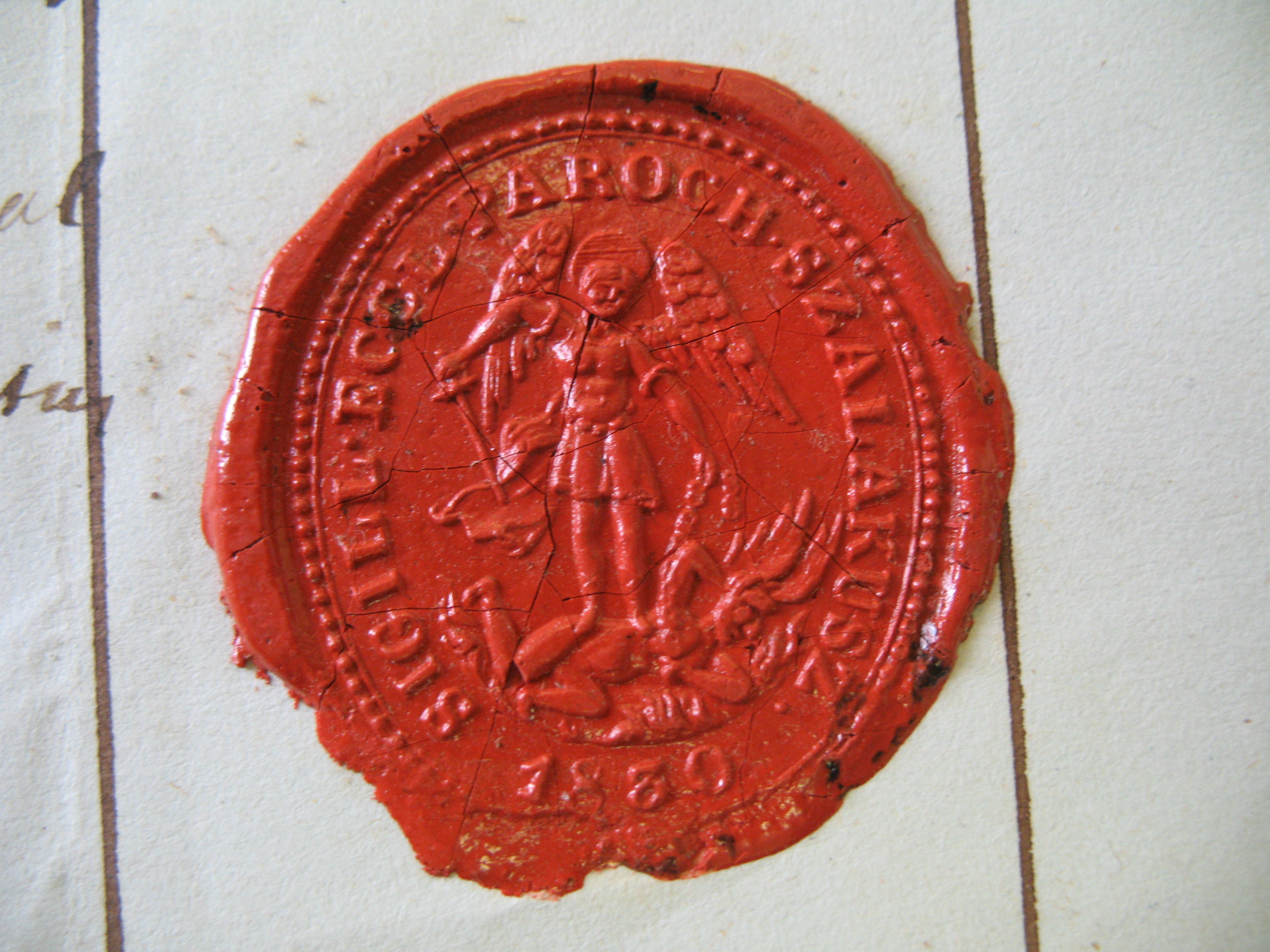 Szalakusz egyház pecsét 1844-ből (ŠA Nitra, NŽ, Nobilitaria, Bíró)